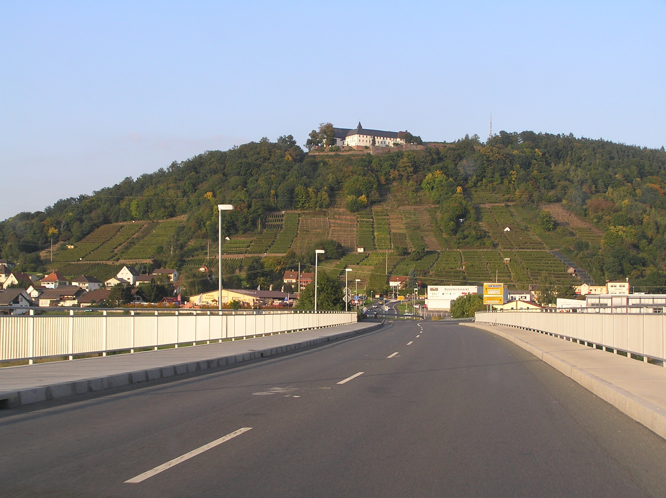 Kloster Engelberg oberhalb von Großheubach, aufgenommen von der Mainbrücke